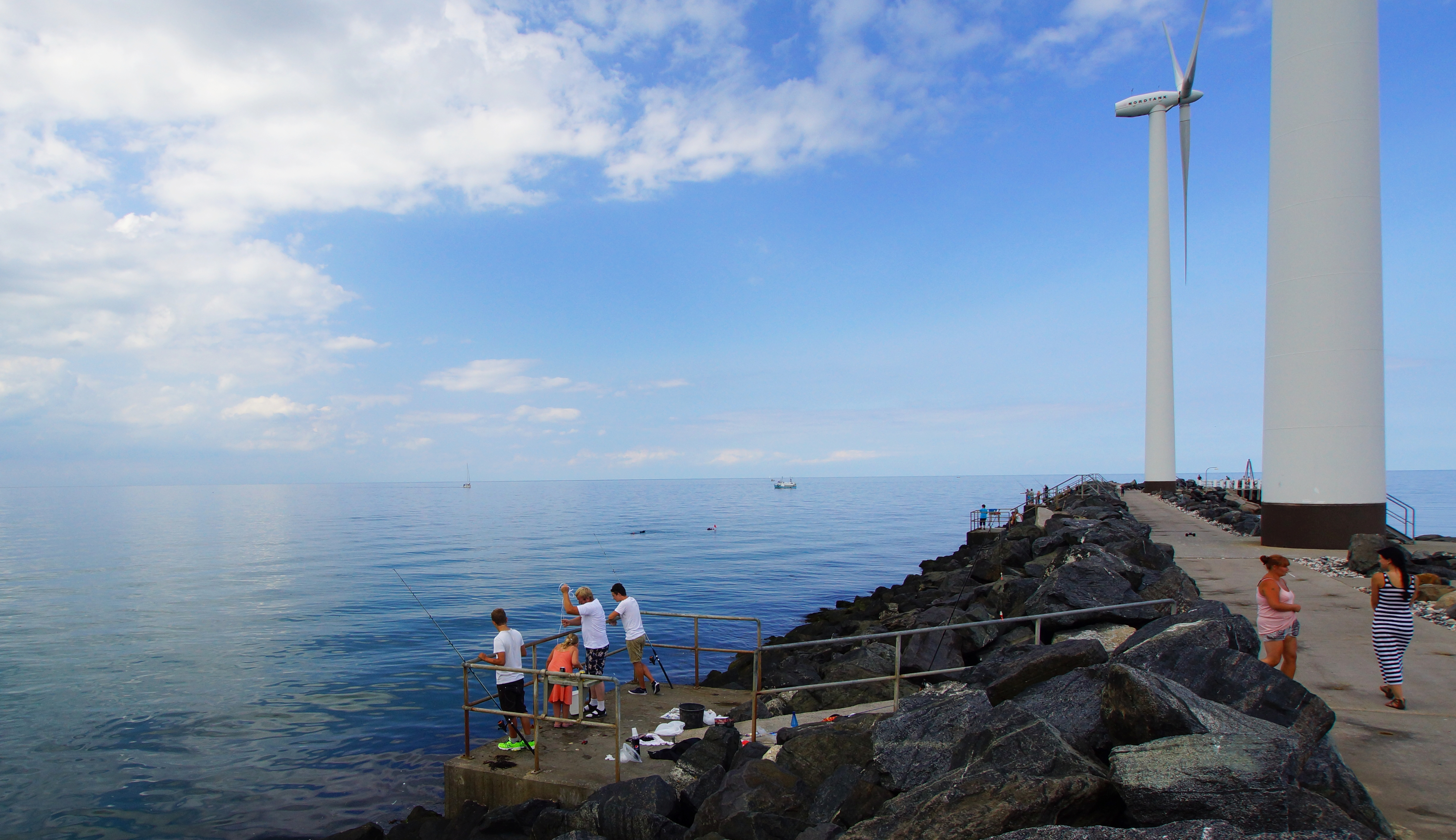 Bønnerup Havn. Der er bygget platforme til lystfiskeri.